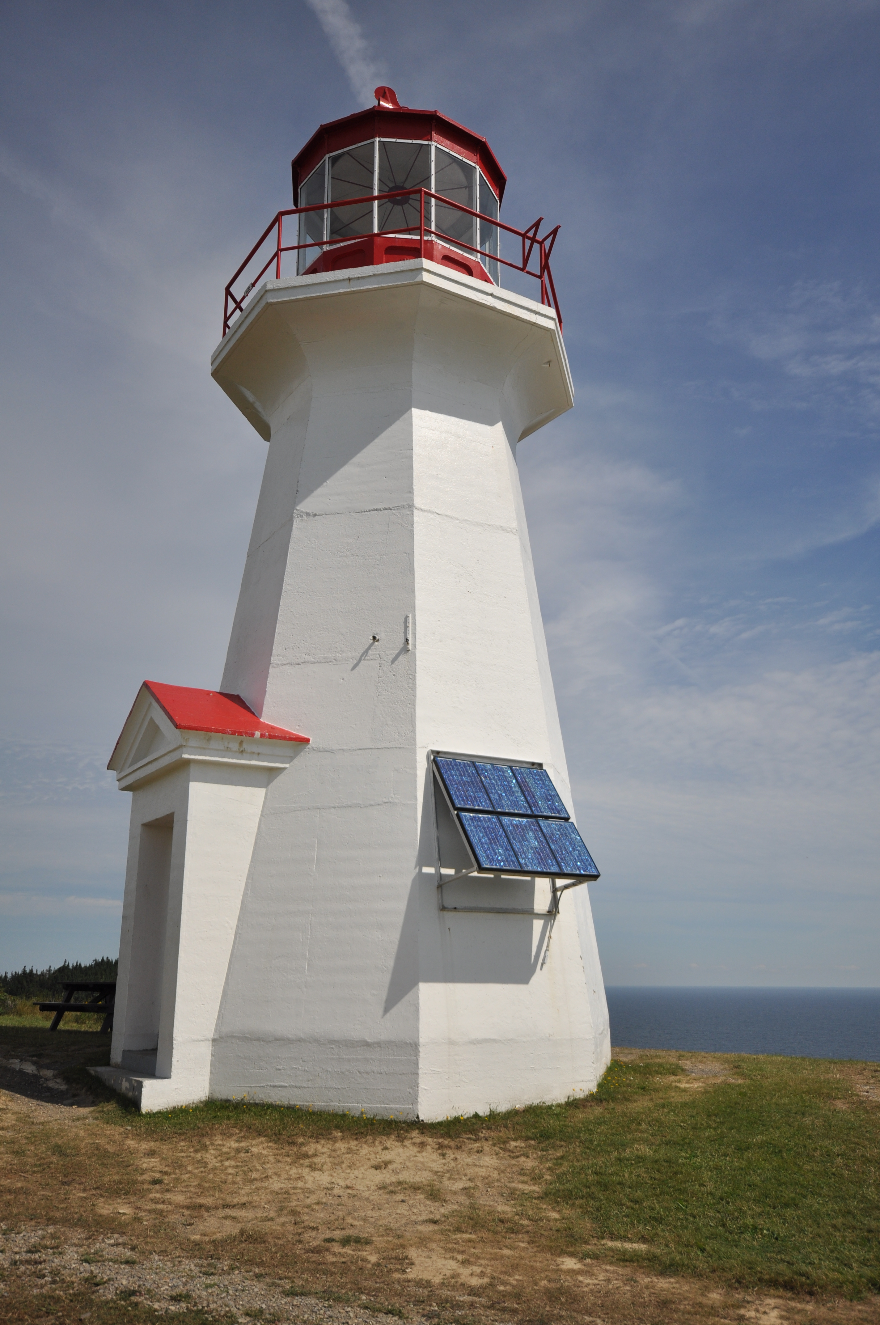 Phare de Cap-Gaspé, Gaspé, Québec (Canada). (Protection ÉFP reconnu. Voir la liste des lieux patrimoniaux de la Gaspésie–Îles-de-la-Madeleine pour plus de détails).